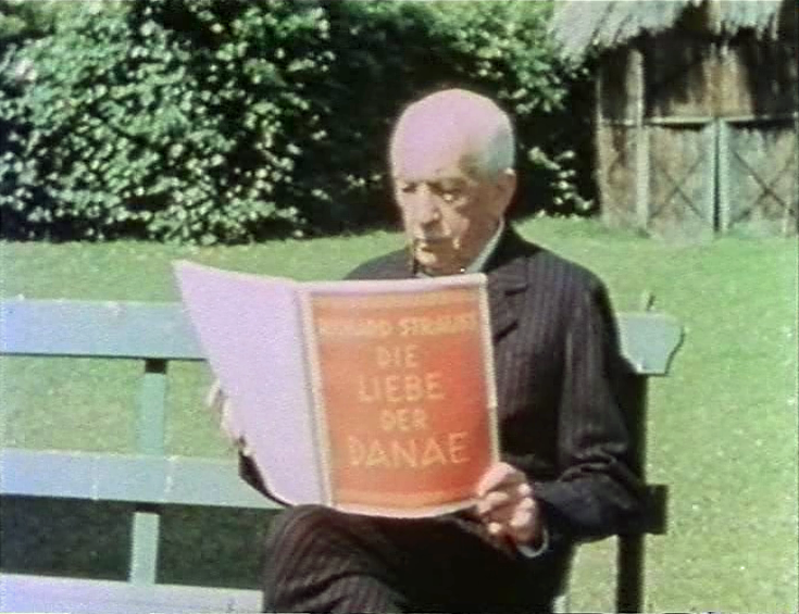 Richard Strauss mit dem Libretto der Oper Die Liebe der Danae (Garmisch-Partenkirchen, 1945)